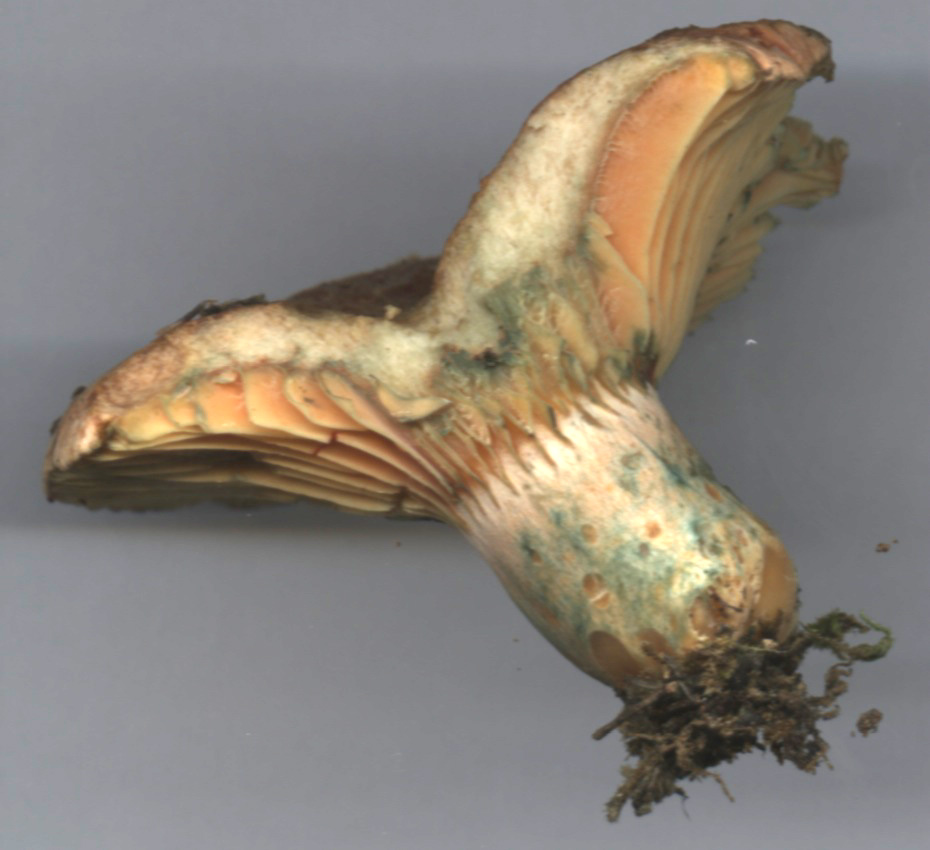 Esclata-sang (Lactarius sanguifluus), Mallorca.